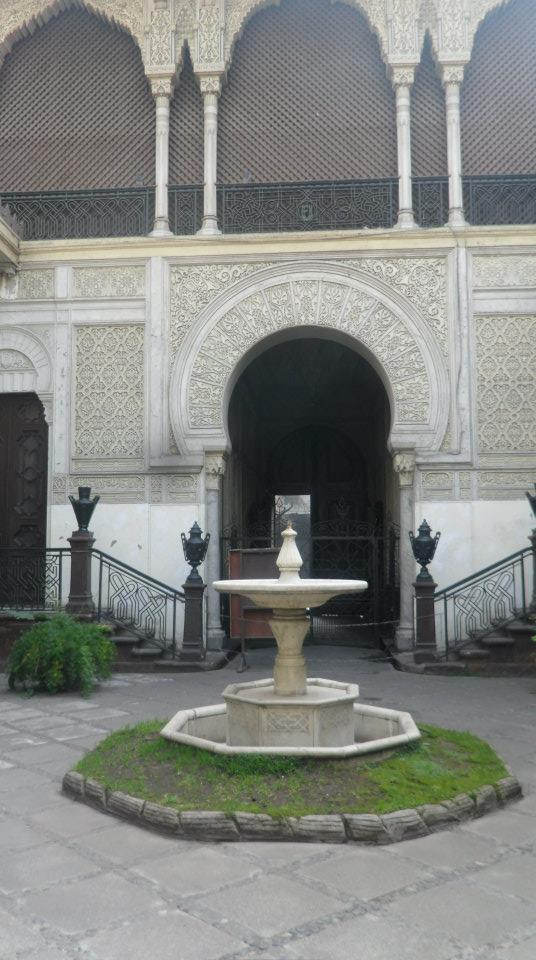 Patio de ingreso al Palacio